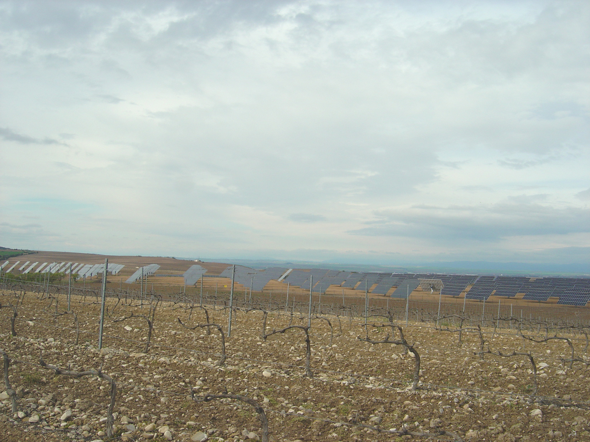 Monte Alto, Campo energía solar, Milagro, Navarra, Spanien.